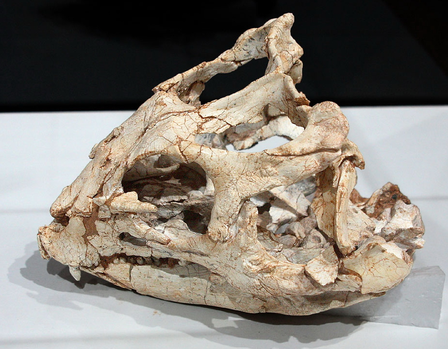 Yinlong - 01